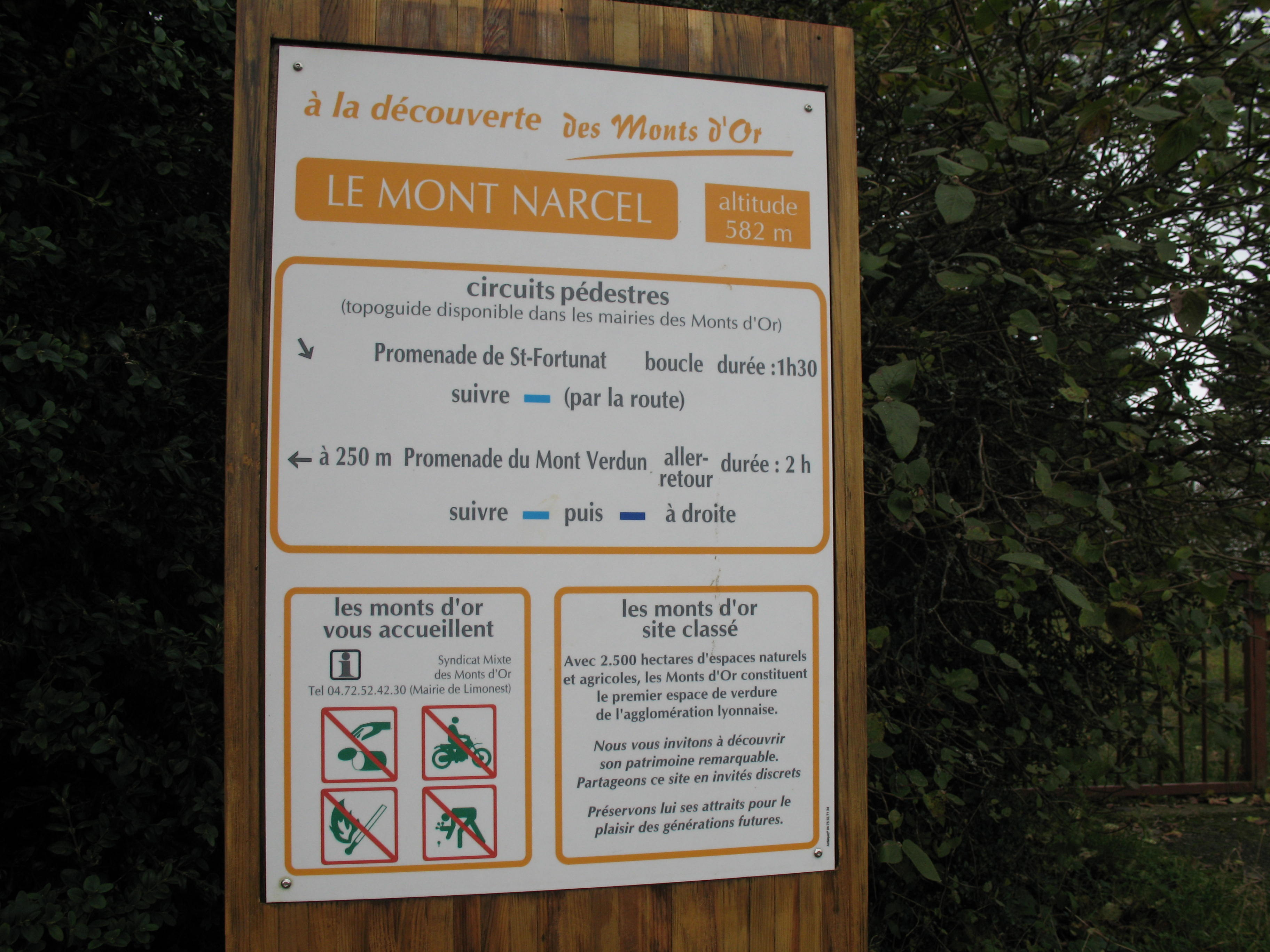 Mont Narcel (582m) - Limite entre Limonest et Saint-Didier-au-Mont-d'Or